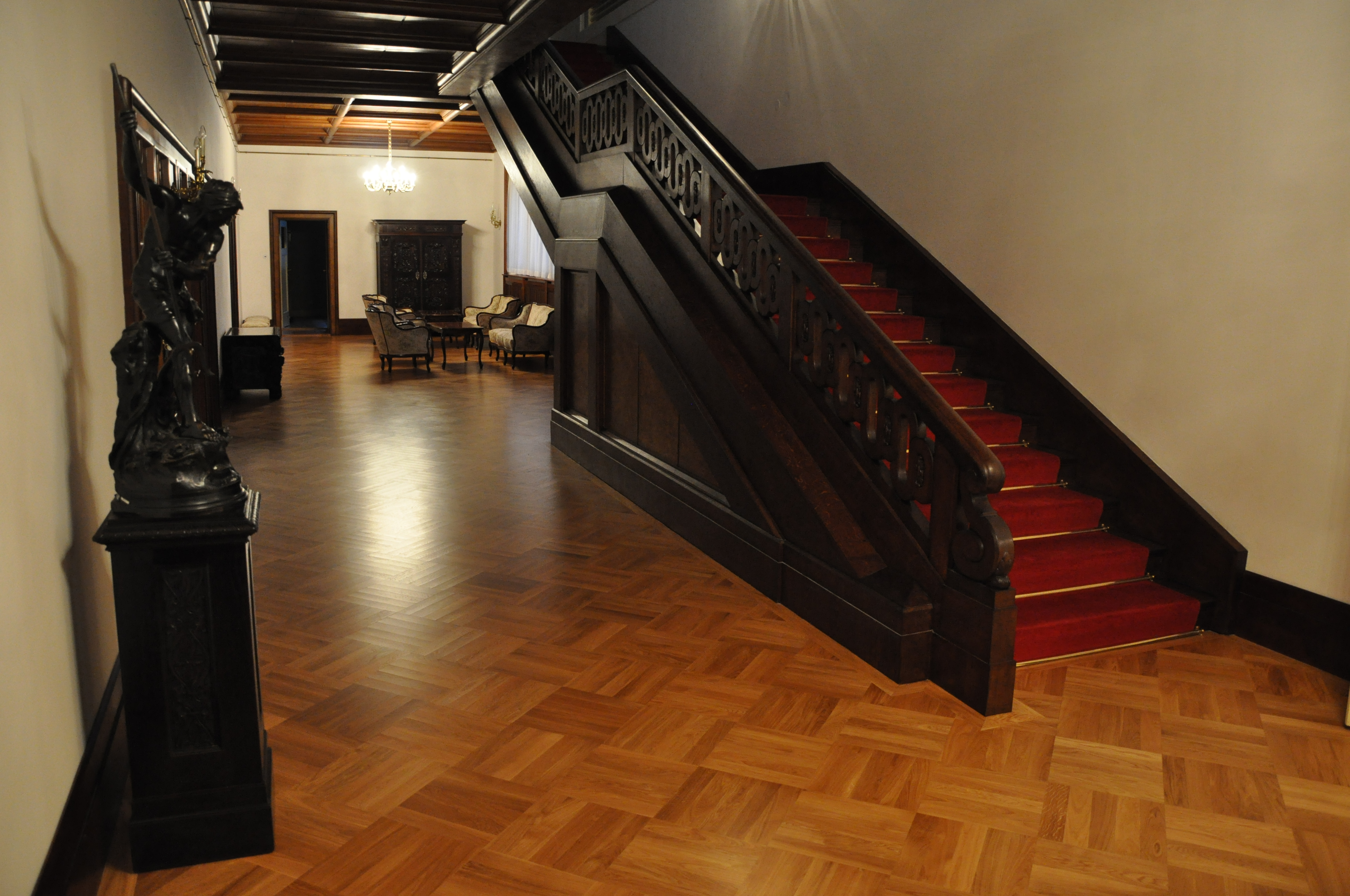 Villa Stiassny. Schodišťová hala.